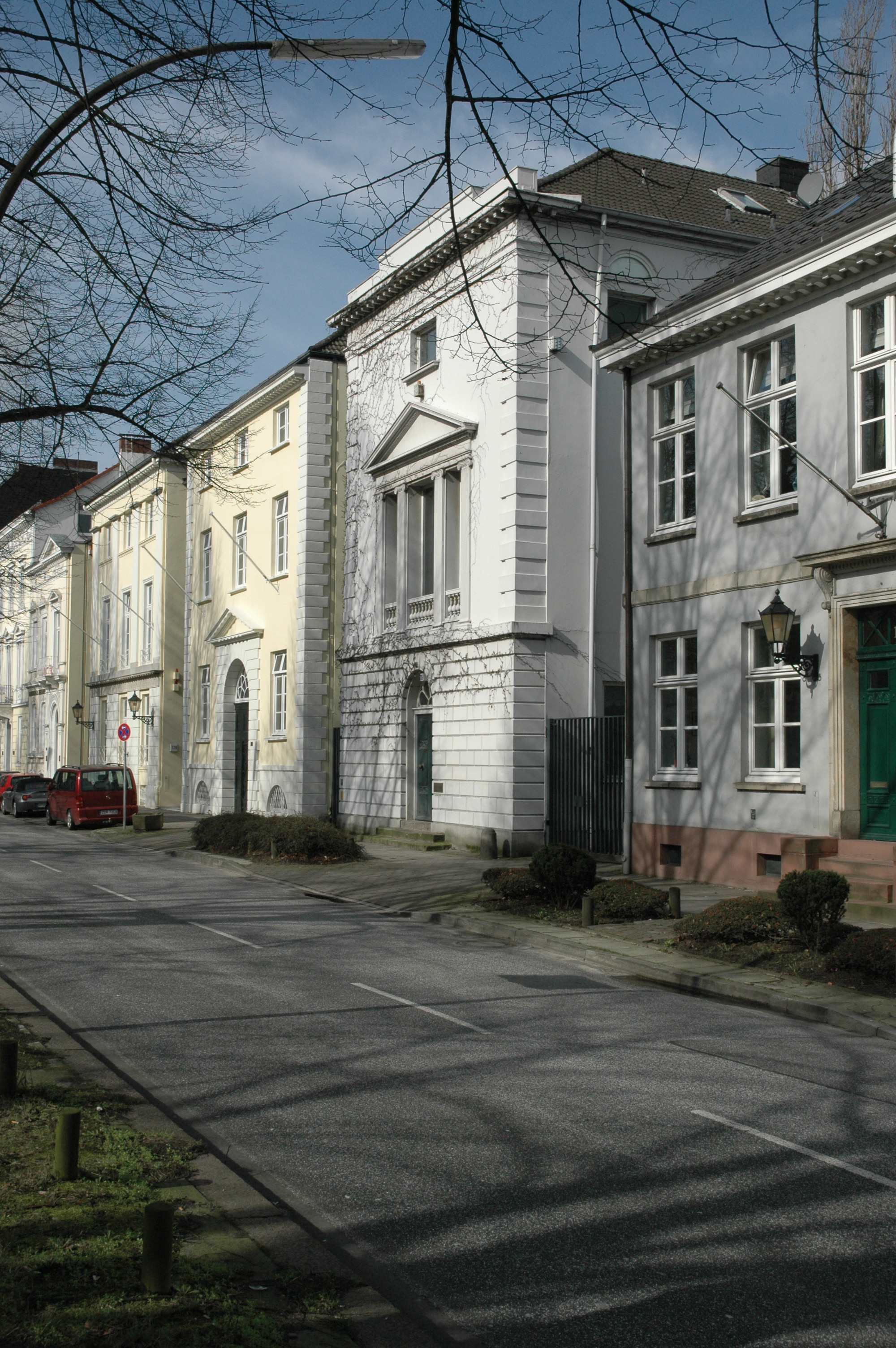 Nordseite, Palmaille 112-122 Hamburg, Altona-Altstadt, Palmaille 112, 114a Wohnhaus Dehn This is a photograph of an architectural monument. 116, 118, 120, 122 Wohnhaus This is a photograph of an architectural monument. , 16251, 16189, 15446 Denkmalliste-Altona 2016 S. 760/1 (PDF; 2 MB) Ensemble Palmaille 112, 114a-120, Ensemble Palmaille 122, 124